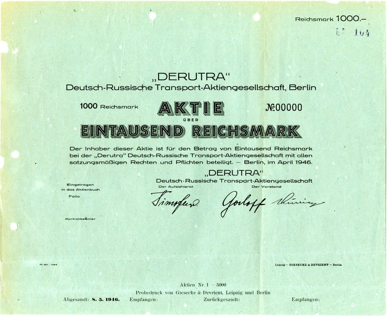 Образец акции на предъявителя в 1000 рейхсмарок немецко-российского акционерного общества "Дерутра". Берлин, 1946 г.